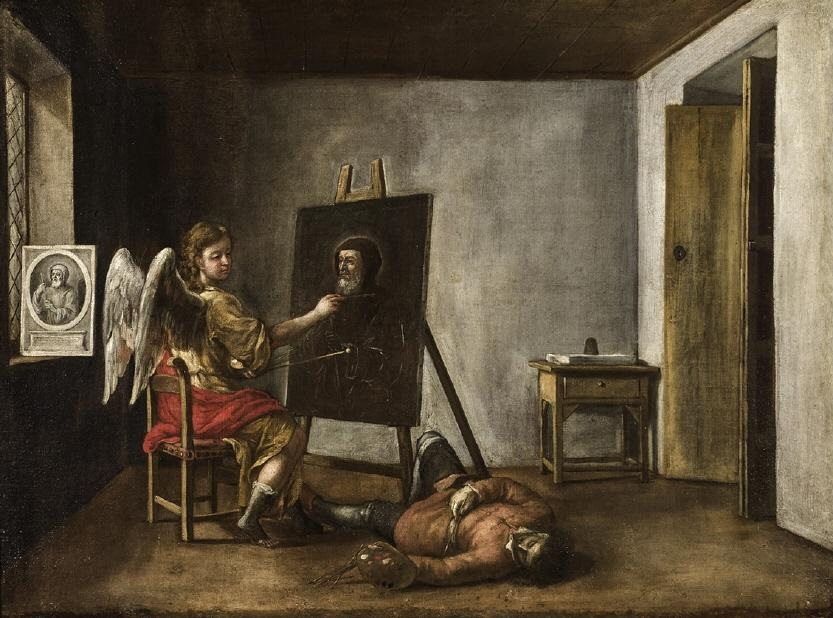 Esta obra representa un milagro que San Francisco de Paula realizó con posterioridad a su muerte, ya que según la leyenda un ángel terminó de pintar un retrato del santo que, copiado de un grabado, estaba pintando un artista antes de morir súbitamente. Además, se trata casi con toda probabilidad de una leyenda, ya que ese milagro no es mencionado por los biógafos del santo.